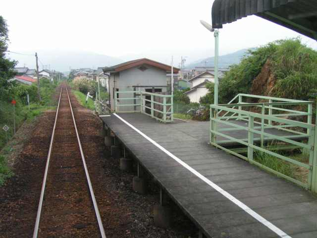 奥浜名湖駅